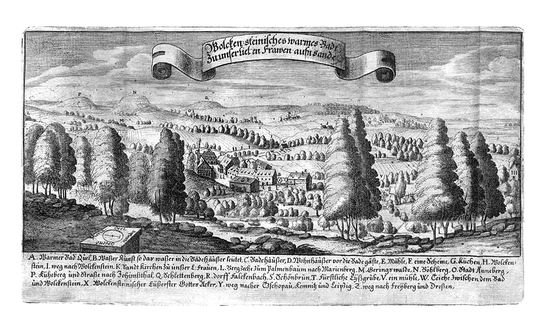 Ansicht von Bad Wolckenstein